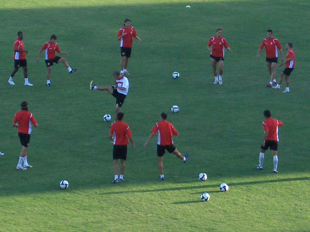 Entrenamiento de la UD Almería, detalle de algunos jugadores de campo